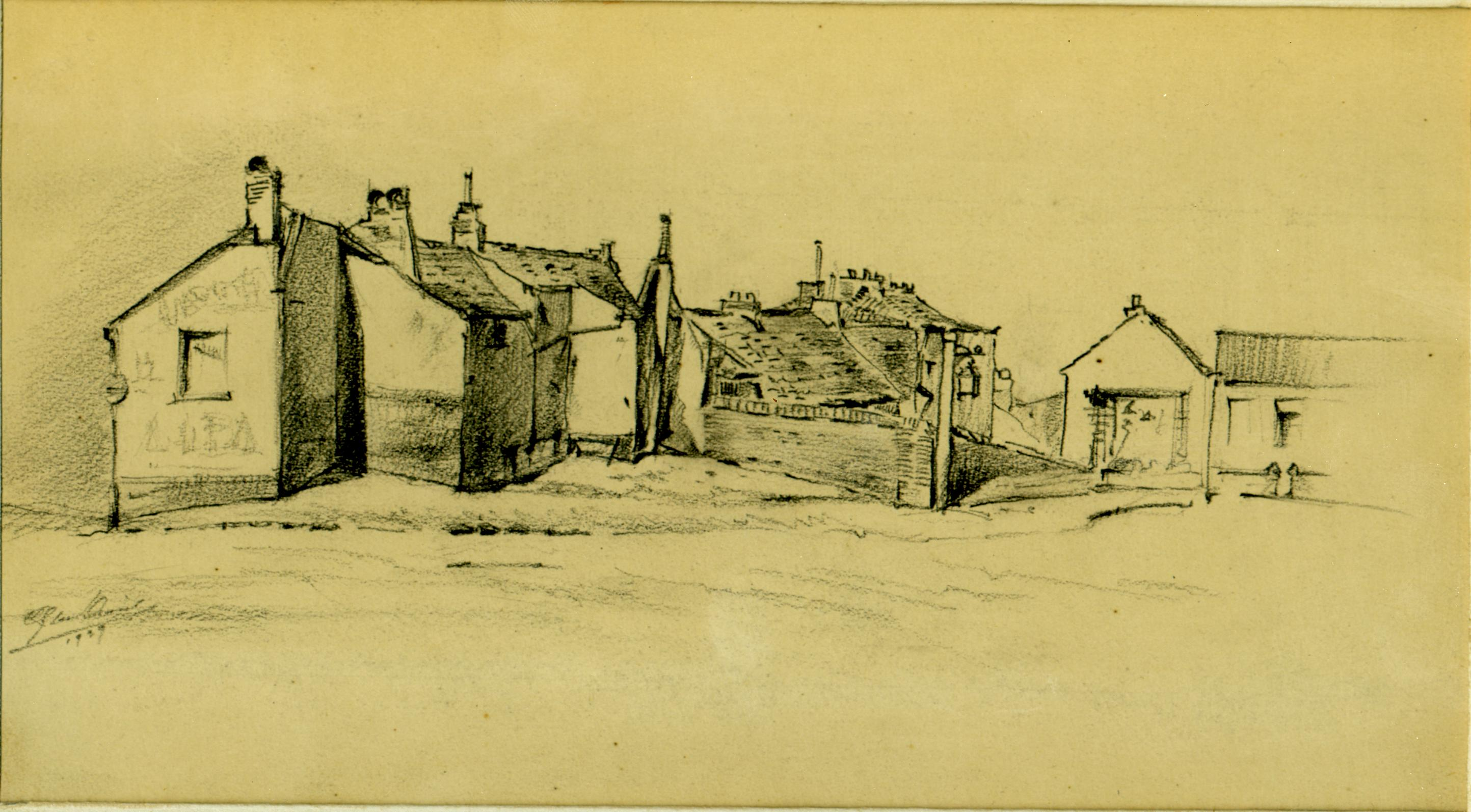 Bruxelles, les Marolles derrière le Palais de Justice, dessin par Léon van Dievoet, 13 juillet 1939.